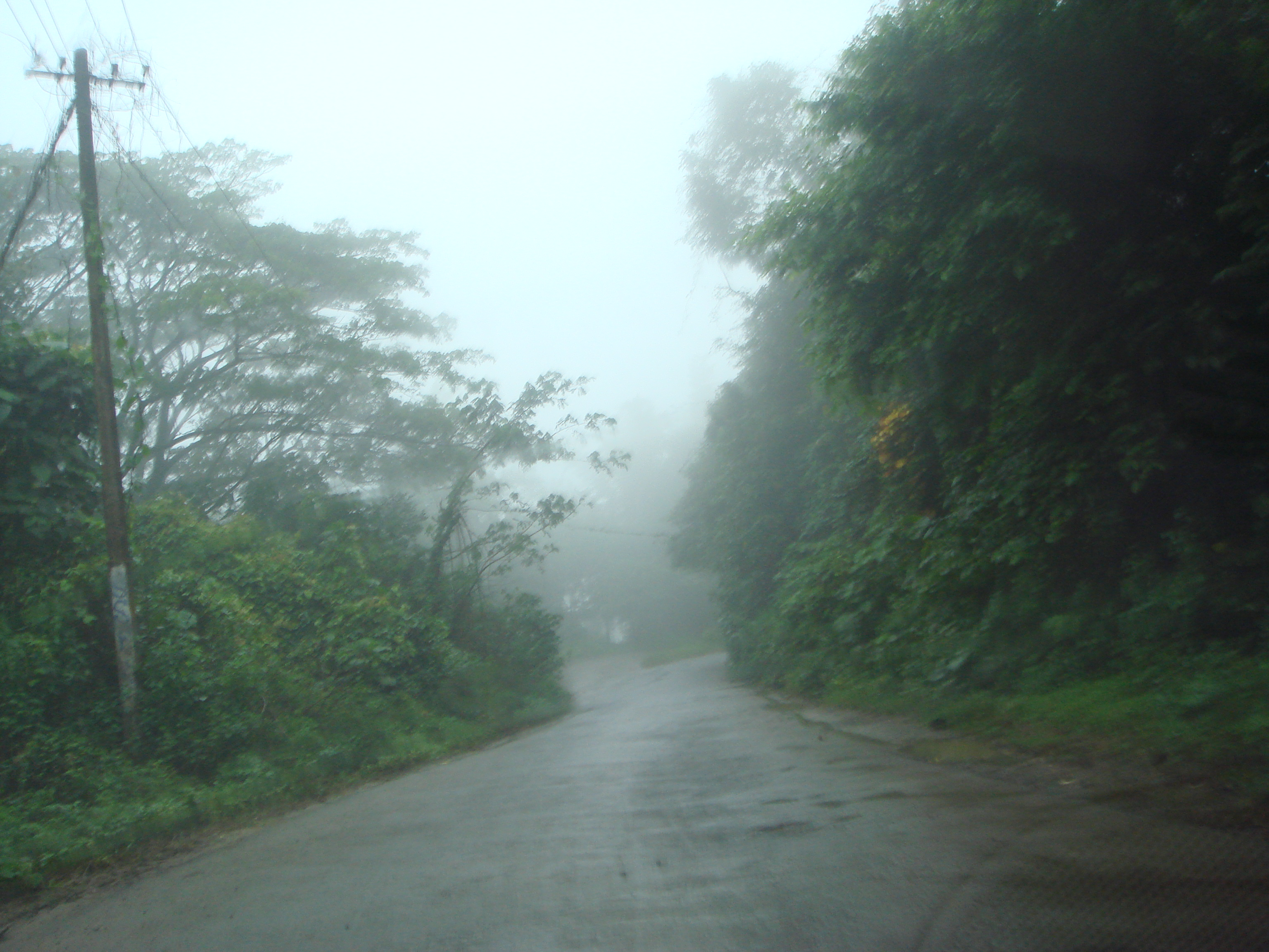 Taken By Myself The Fogy Route towards Attappady from Mannarkkad.